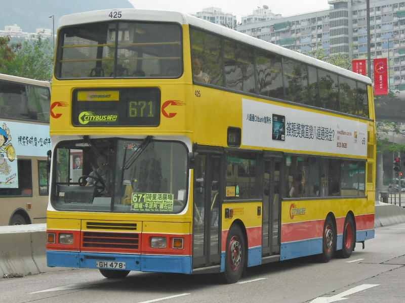 中文（香港）: 城巴671線巴士，攝於新蒲崗彩虹道近四美街的巴士站。